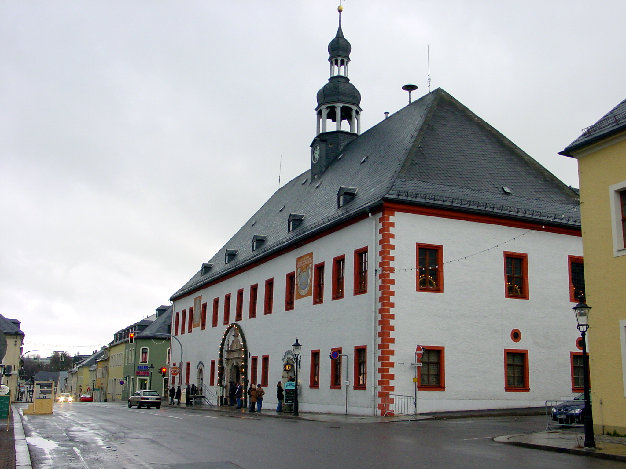 Das Rathaus der Stadt Marienberg im Erzgebirge (Deutschland) 14.12.2003 (foto by geme)